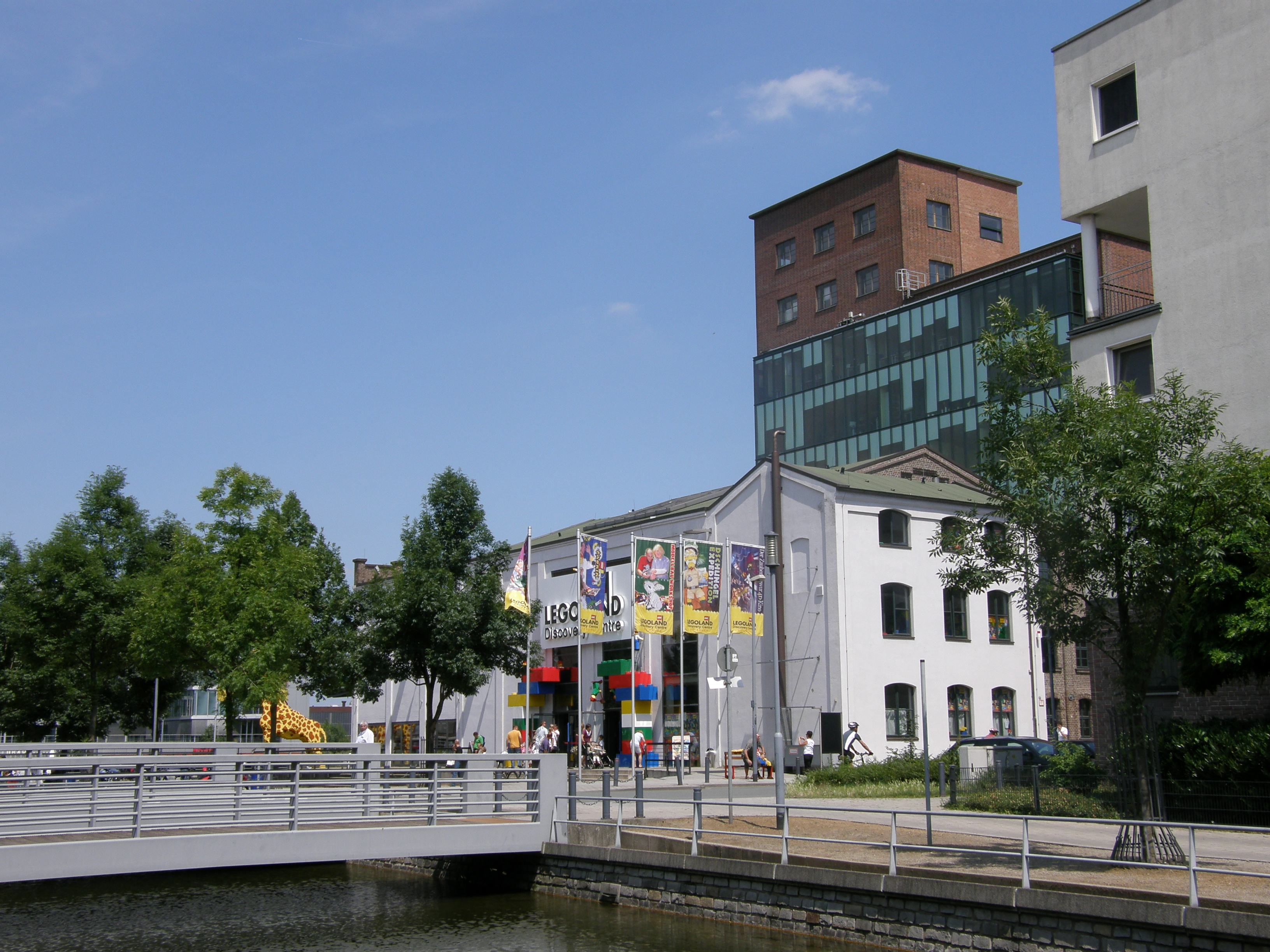 Eingangsbereich des Kindermuseums "Legoland Discovery Centre Duisburg" in der ehemaligen Werhahnmühle am Duisburger Innenhafen